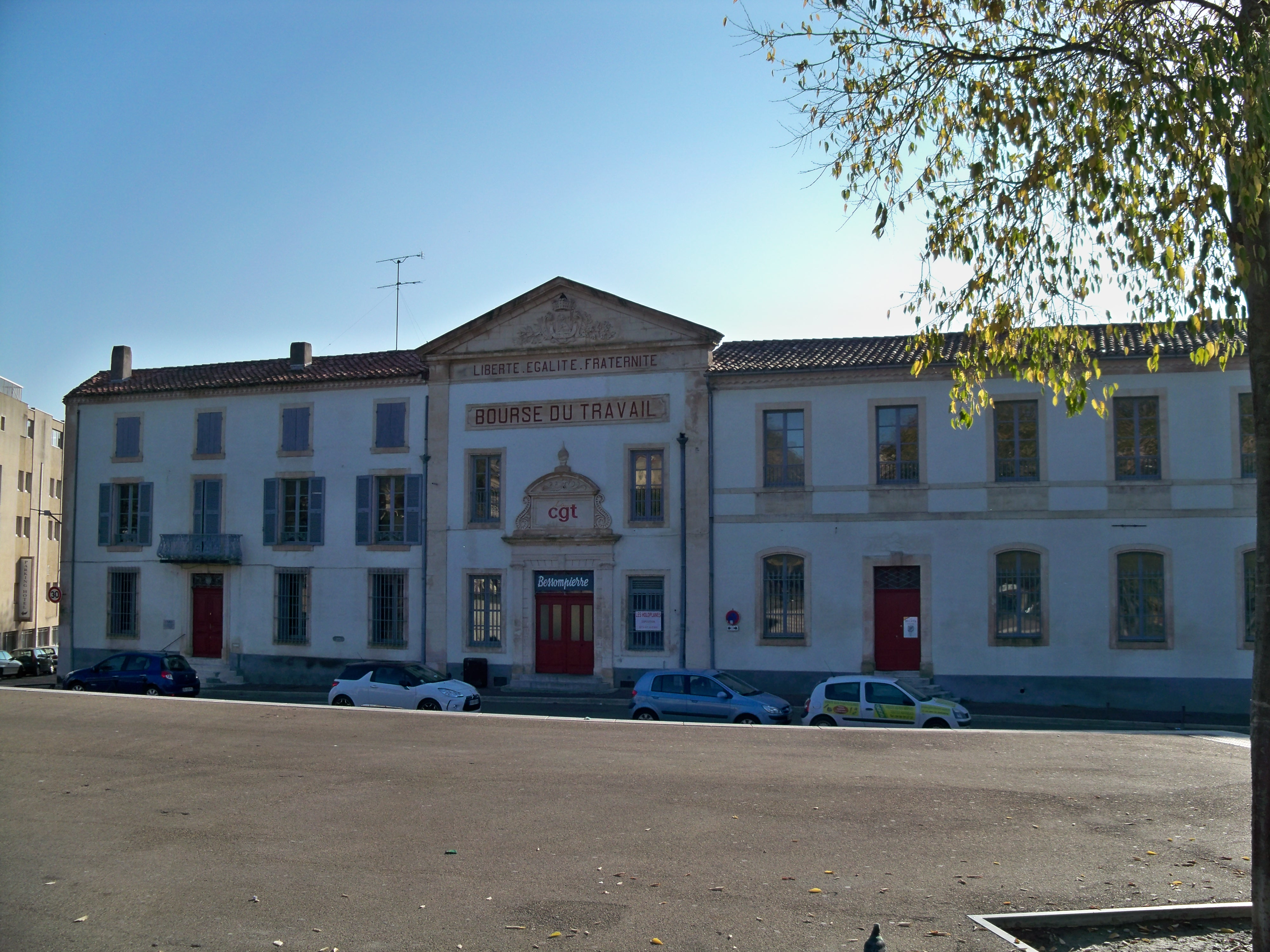 Batiment de la bourse du travail à Arles (13)